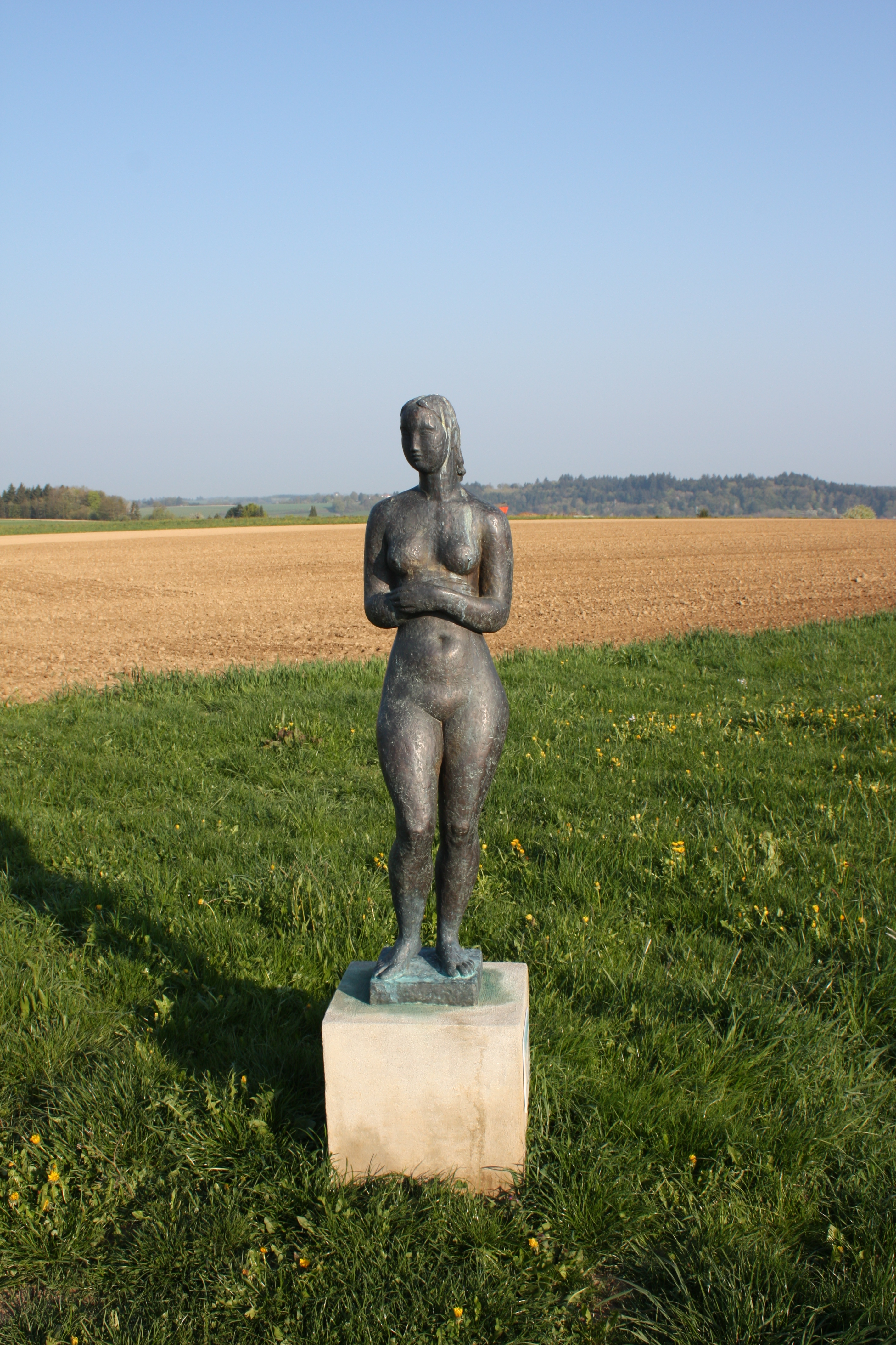 Jakob Wilhelm Fehrle: "Mädchen" (1952) Standort "Skulpturenpfad" in Straßdorf (Schwäbisch Gmünd)